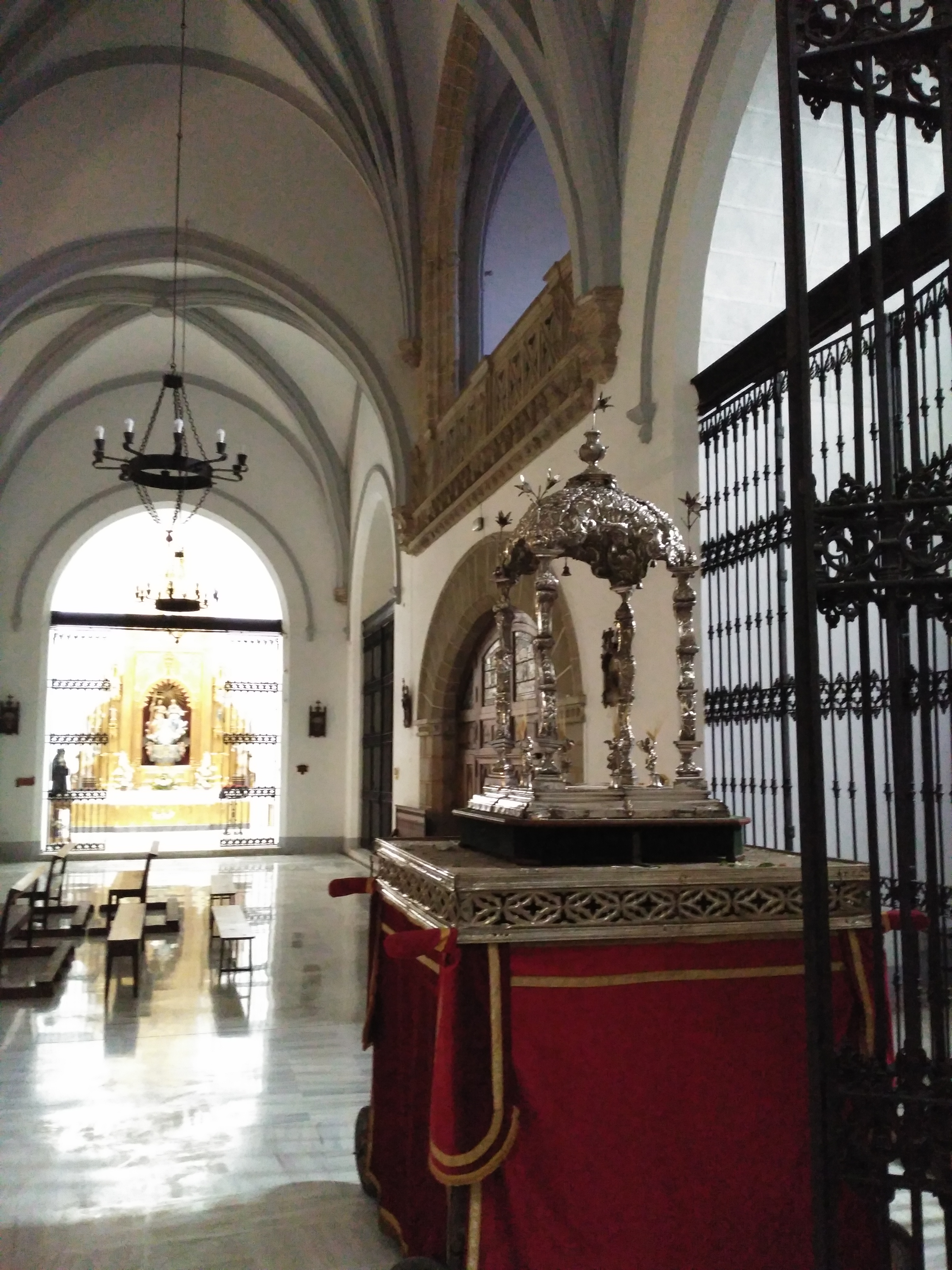 Vista de capillas de Santa Maria del Valle